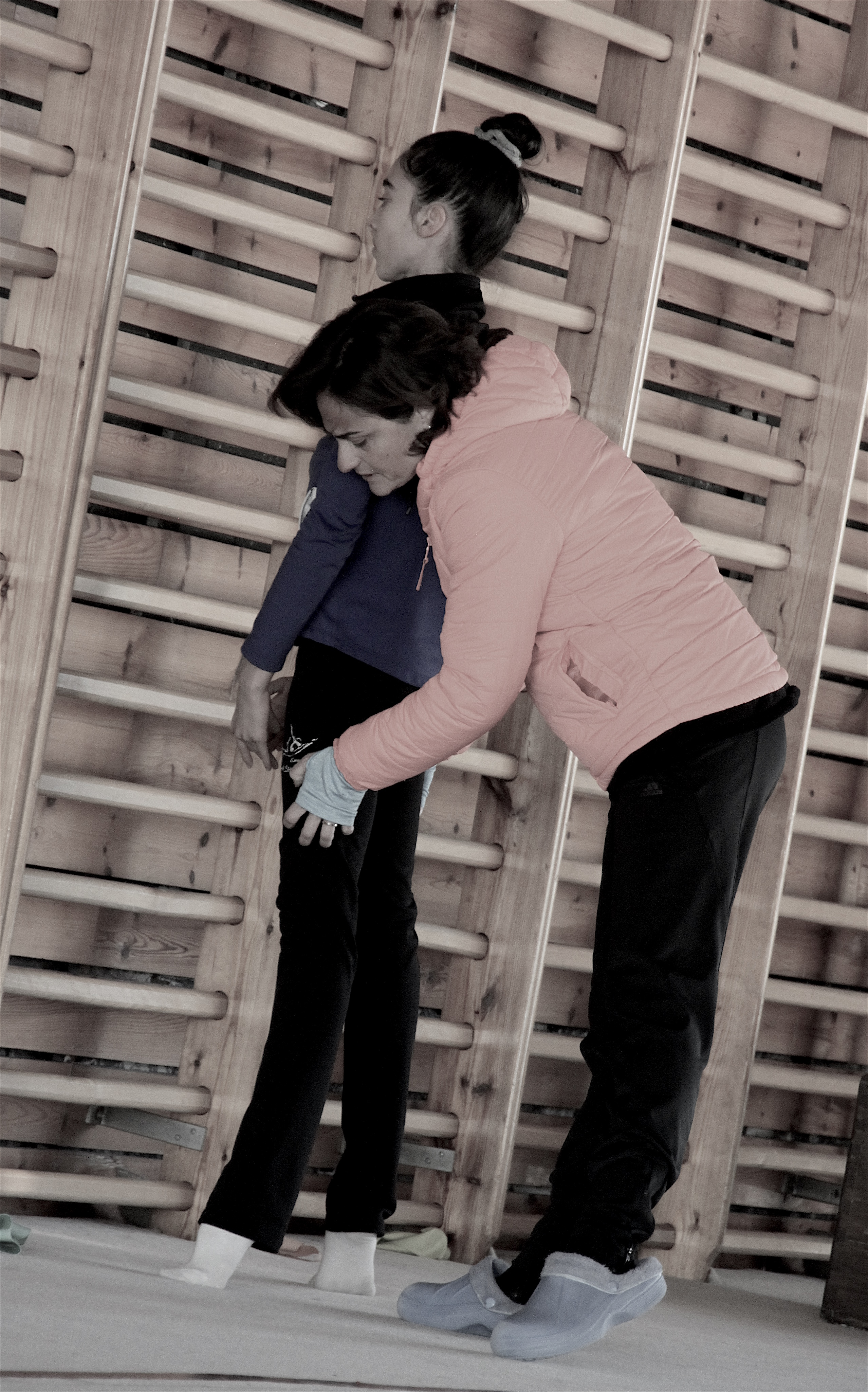 Iratxe Aurrekoetxea con la gimnasta júnior Elisa Pérez en el CAR de San Cugat en diciembre de 2016.